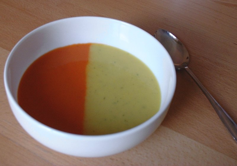 Bol de soupe aux poivrons froide bicolore